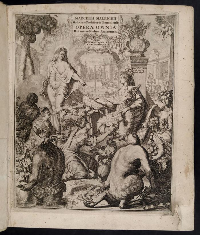 Marcelli Malpighii ... Opera omnia, seu, Thesaurus locupletissimus botanico-medico-anatomicus :viginti quator tractatus complectens et in duos tomos distributus, quorum tractatum seriem videre est dedicatione absolutâ.